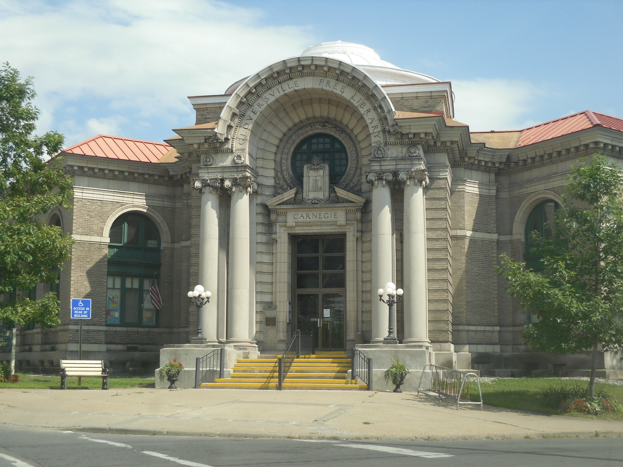 Gloversville, New York